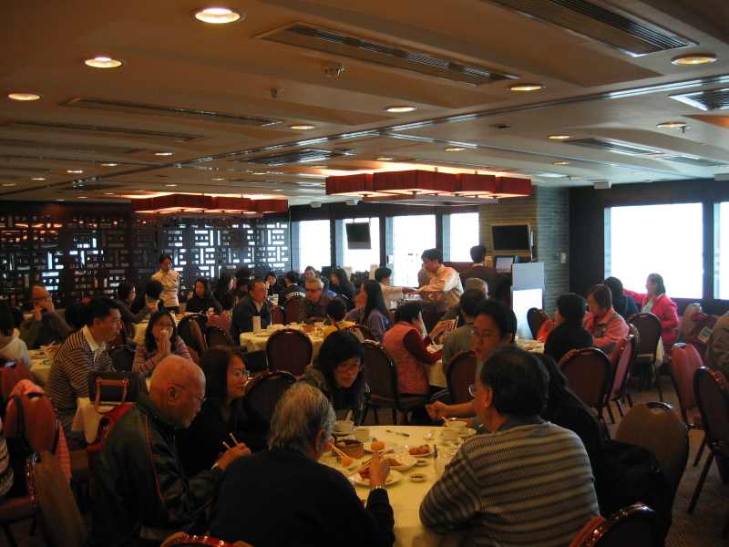 HK Shatin Lee Garden Restaurant Interior